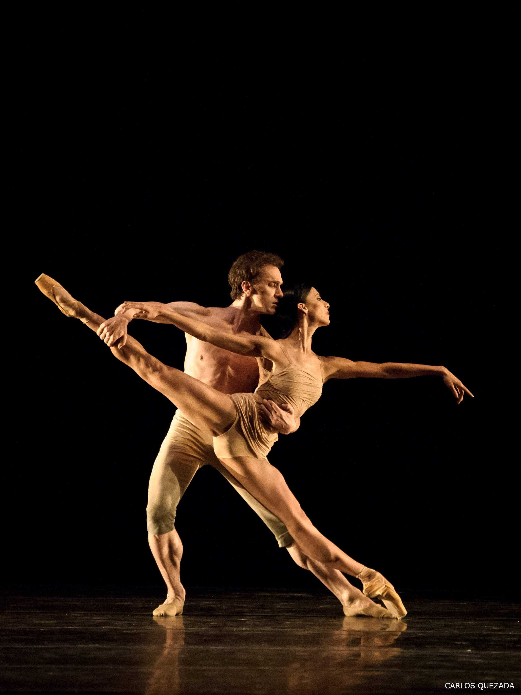 Caravaggio (fotógrafo: Carlos Quezada)